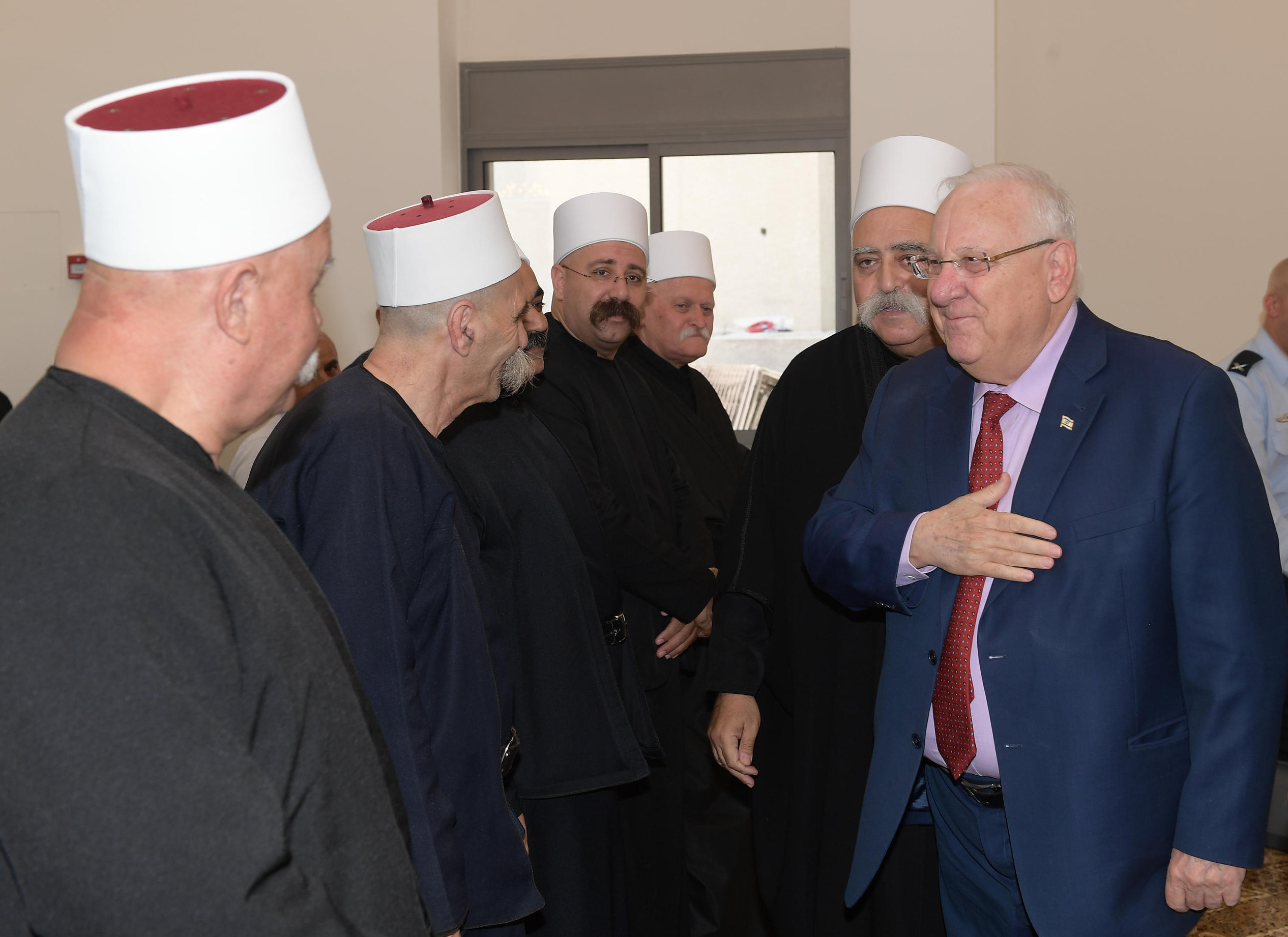 ראובן ריבלין נשיא מדינת יראל בביקור בכפר הדרוזי ג'וליס לרגל חגה של העדה הדרוזית נבי שועייב